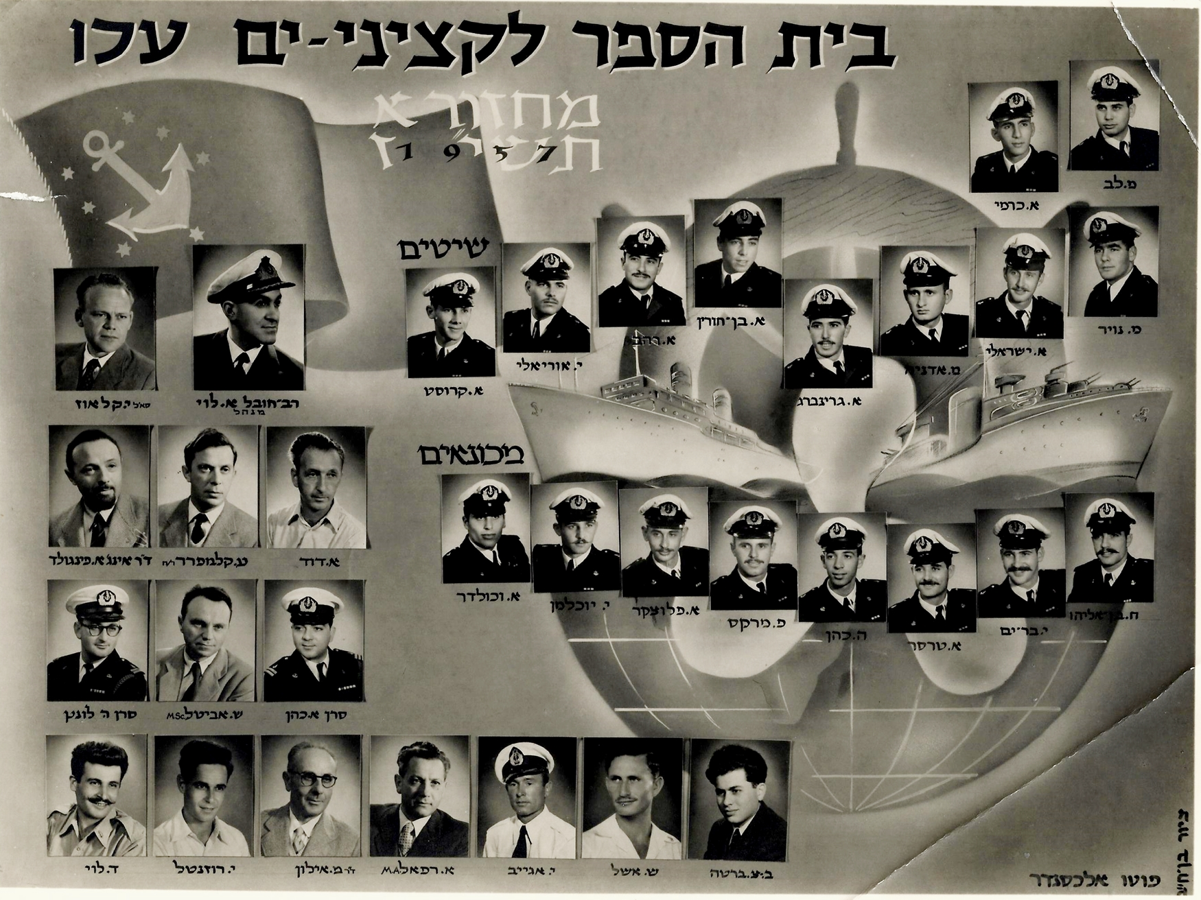 מחזור א' קציני ים בסיום חמש שנות לימוד לאחר סיום קורס חובלים ה 1957